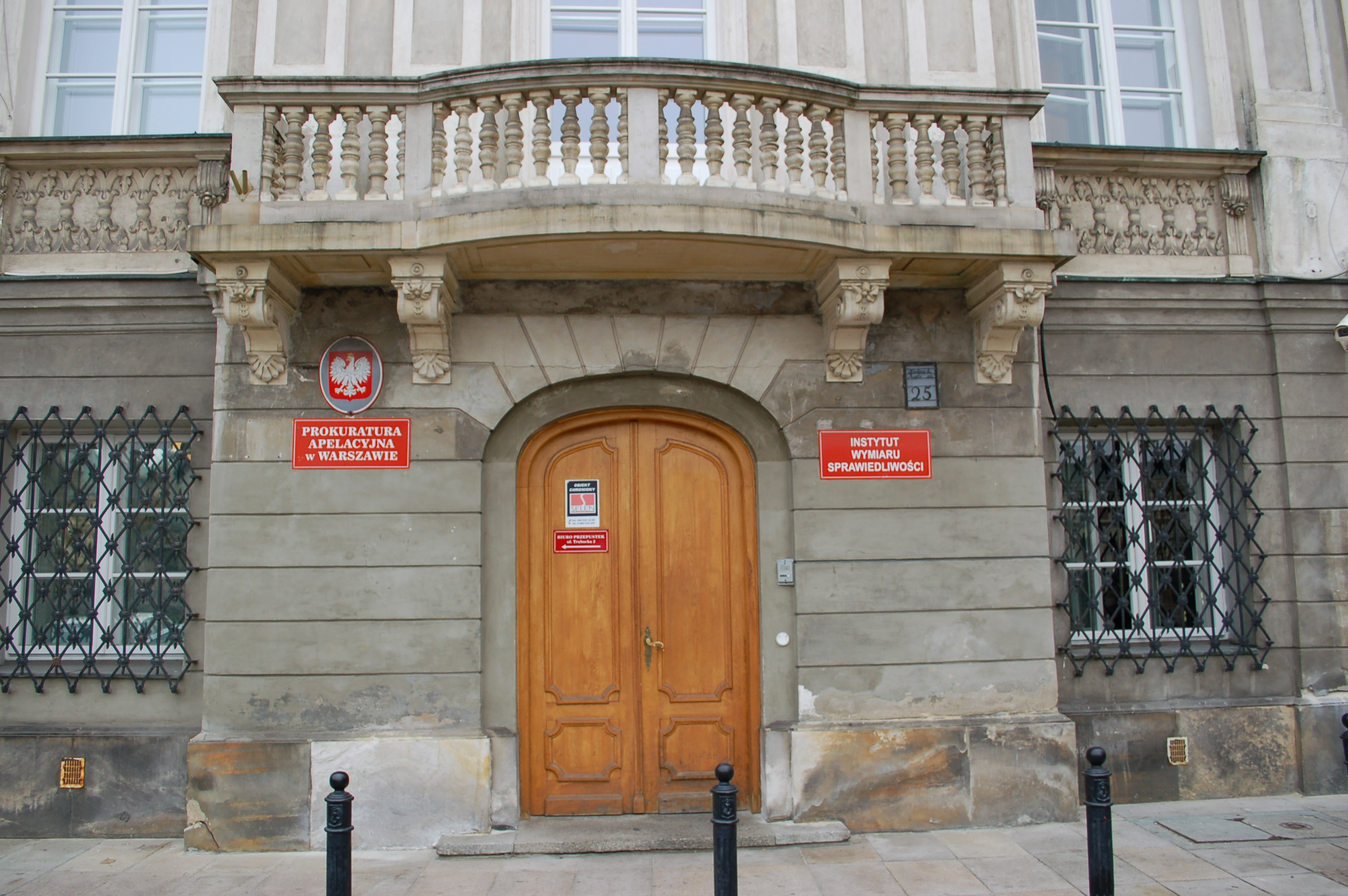 Wessel Palast Warschau